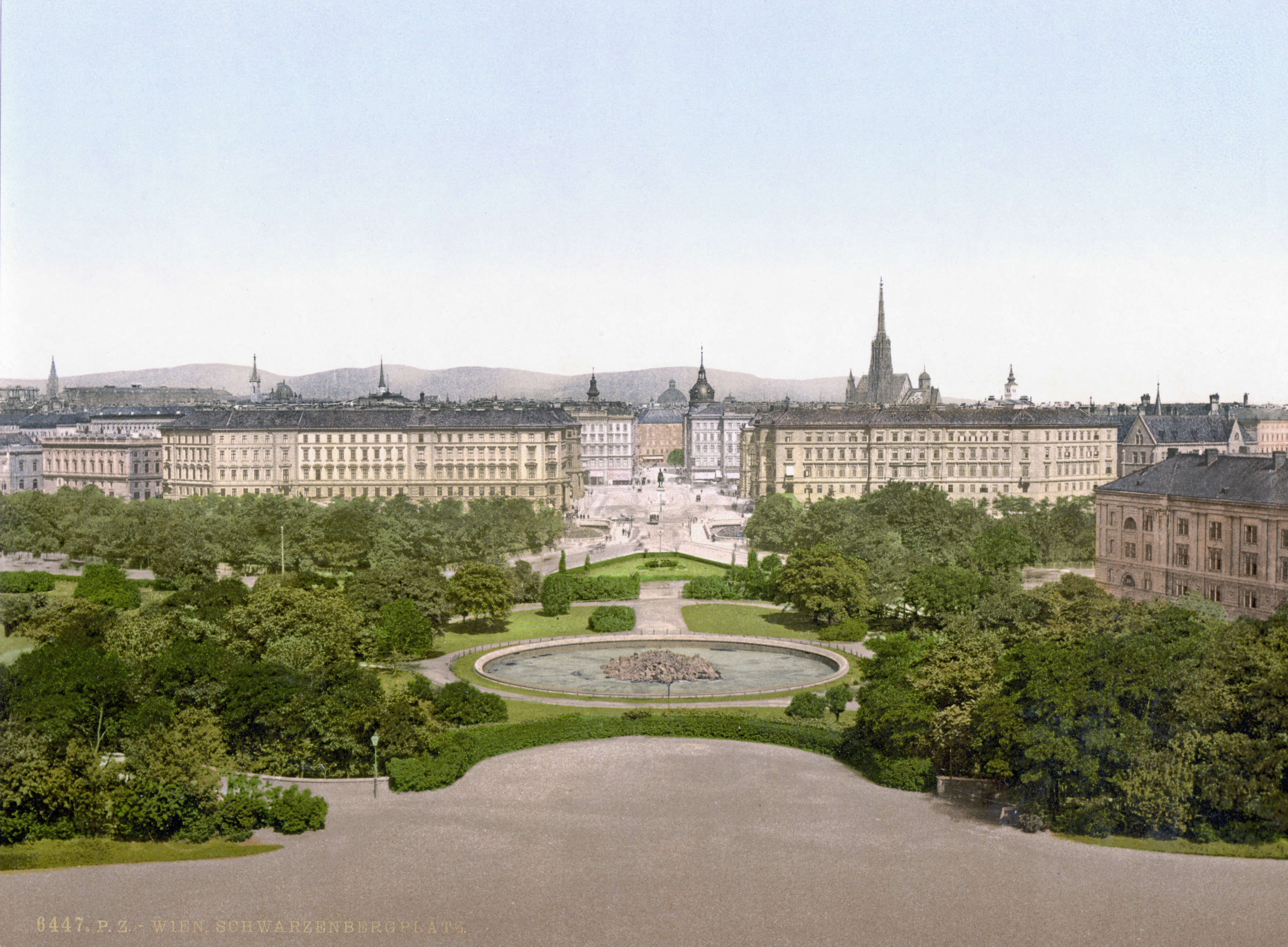 Schwarzenbergplatz in Wien um 1900